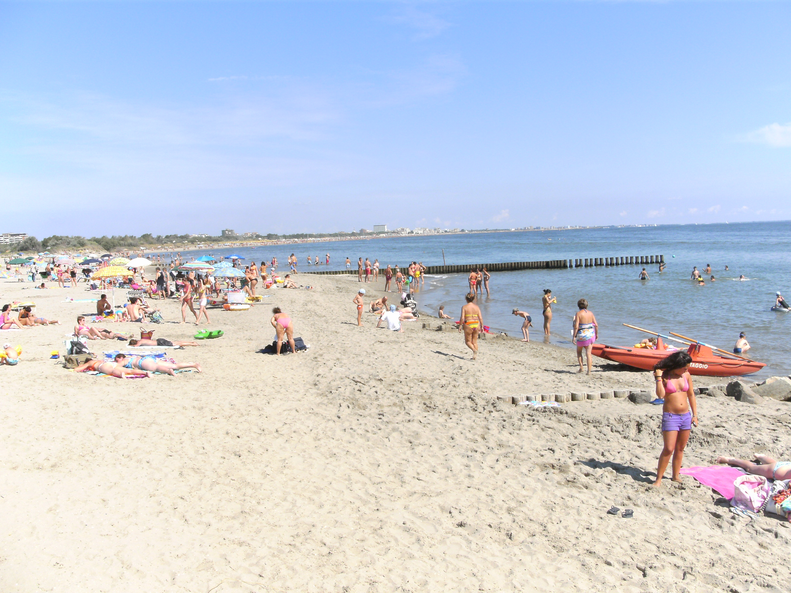 freies Strandgebiet in Lido di Spina zwischen dem südlichsten Bagno (Bagno Jamaica, Nr. 64) und Bagno Pyramidi, Nr. 63